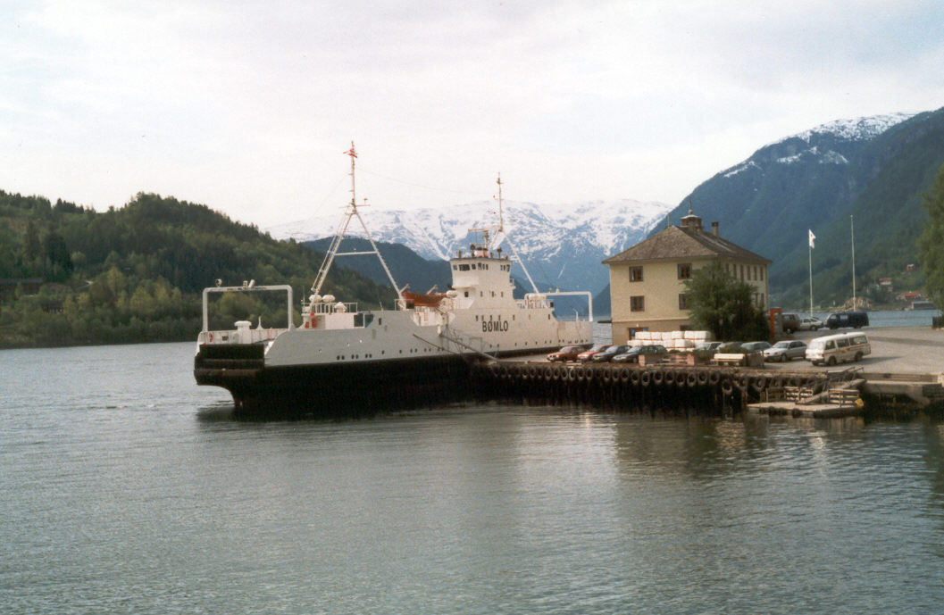 MF Bømlo, built 1972 as MF Herdla.